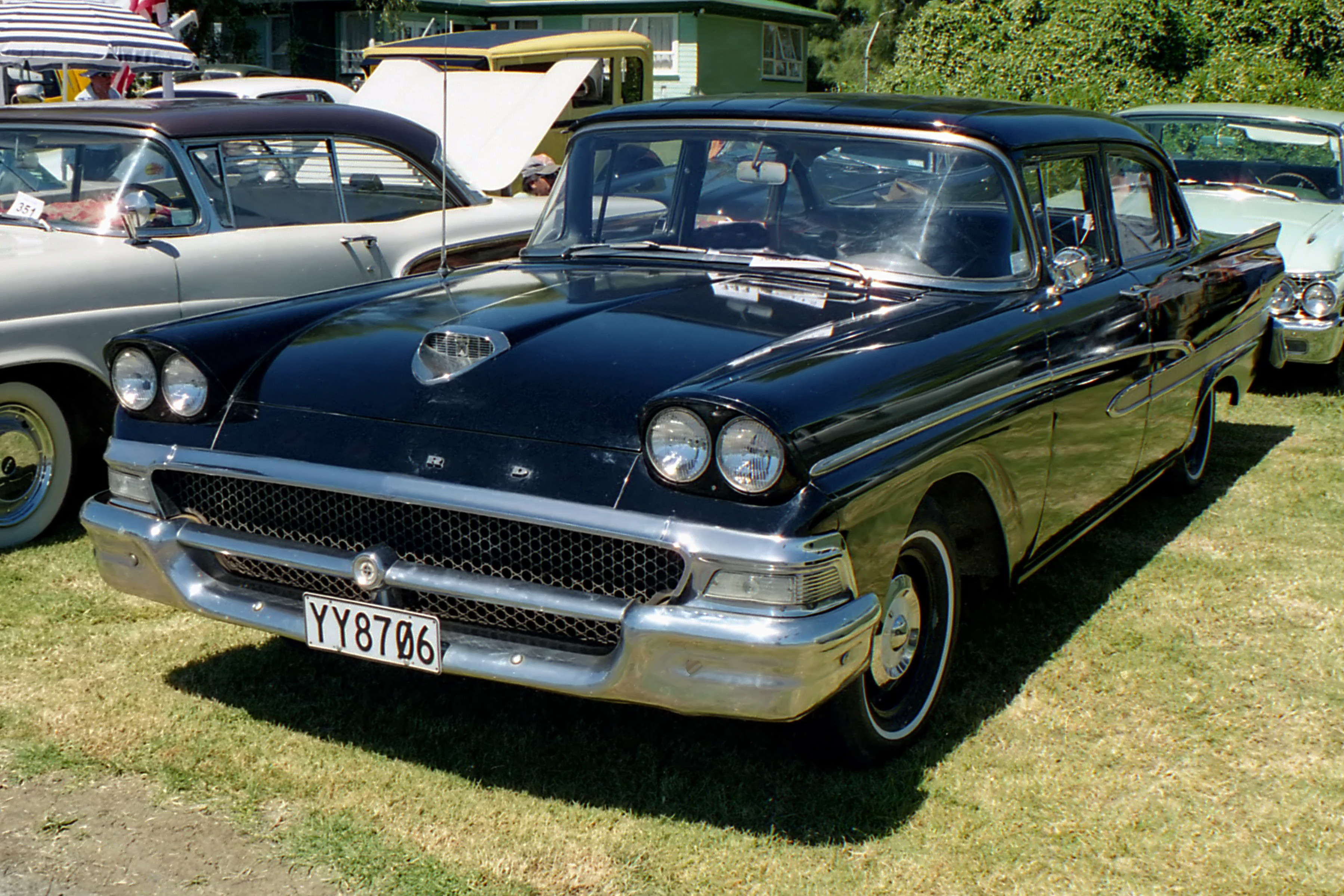 Western Springs,Auckland.New Zealand